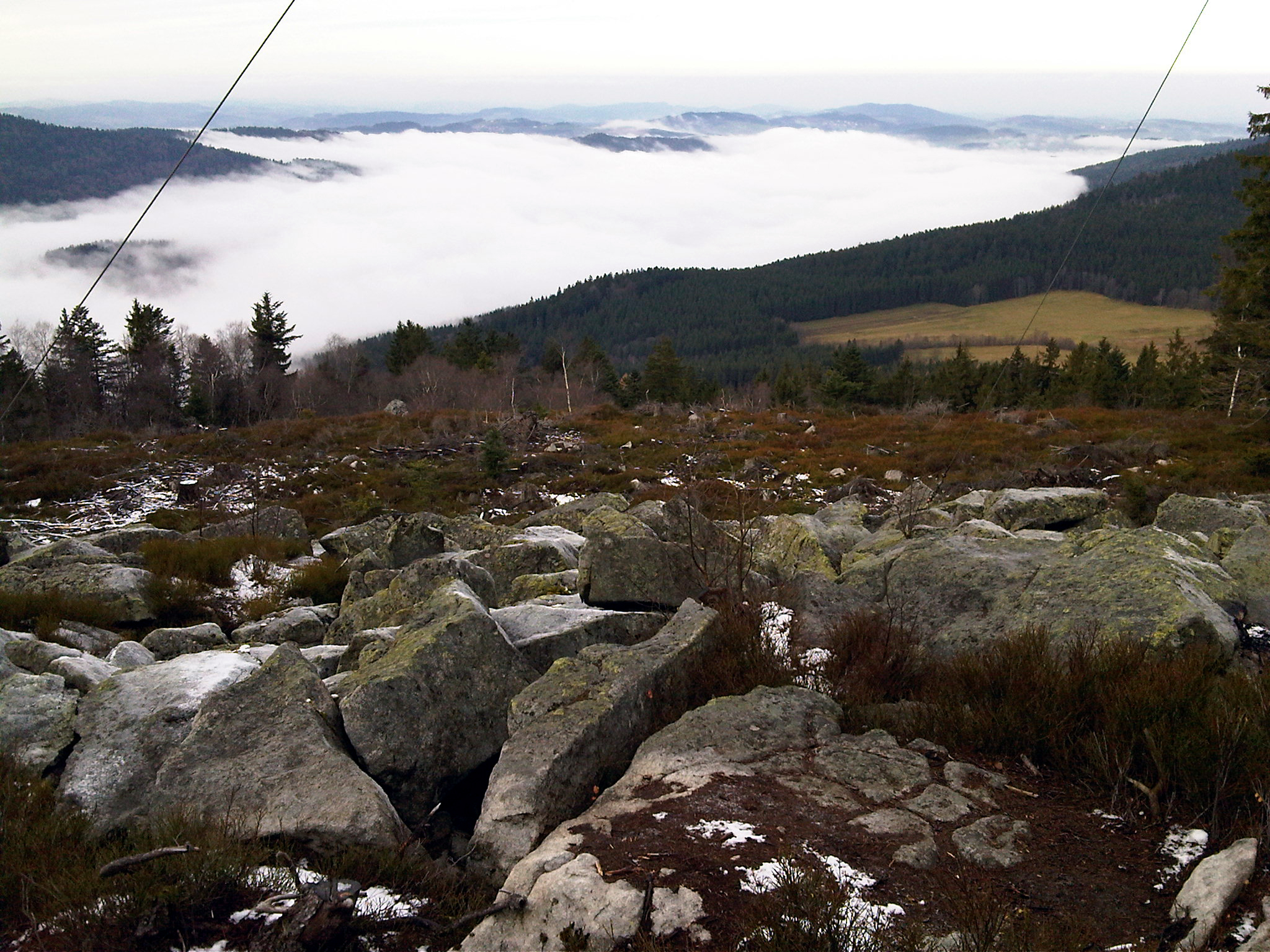 Blick vom Gipfel der Käsplatte Richtung West